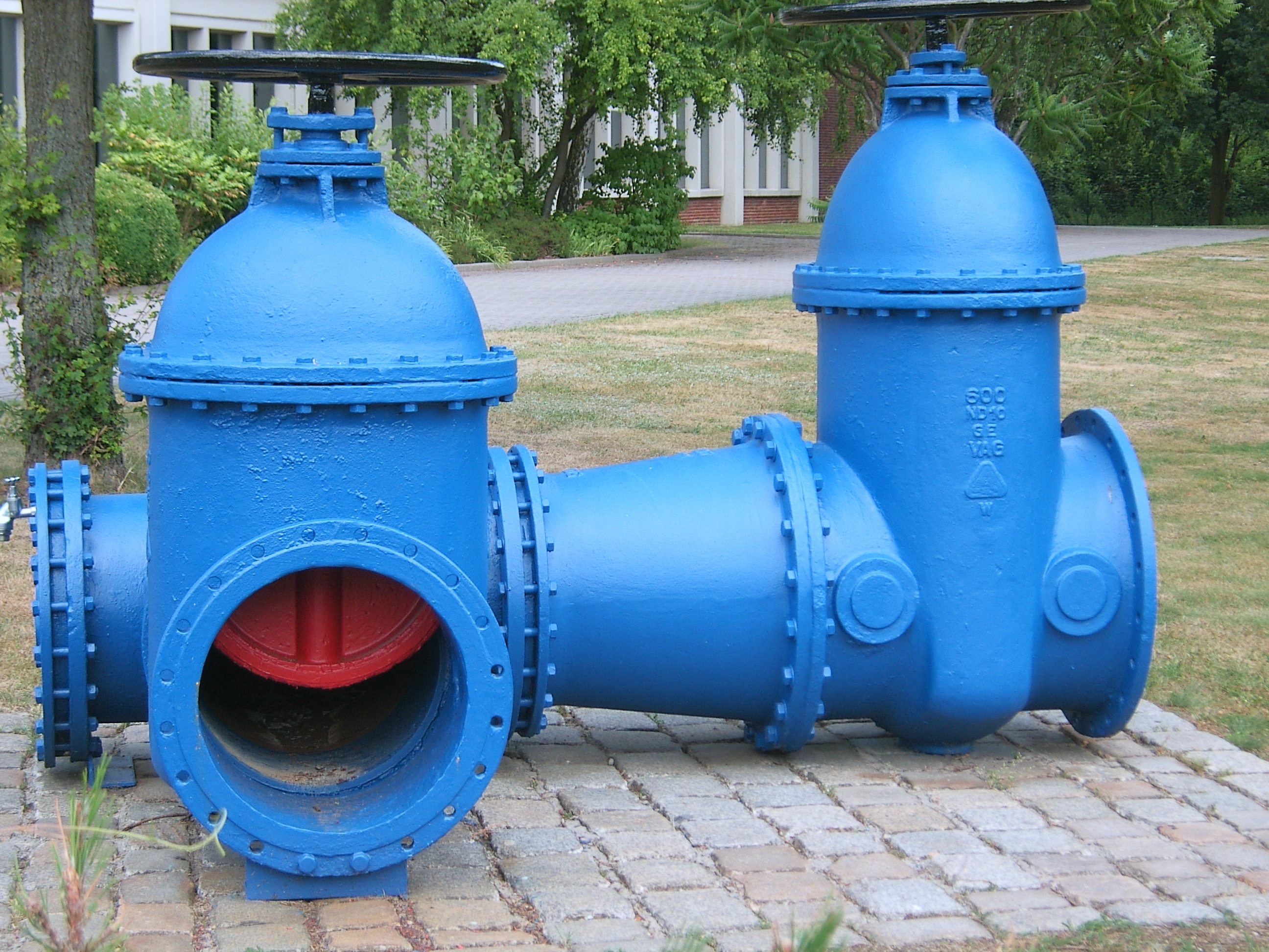 Hamburg, Hausbruch, Wasserwerk, 2 Schieber 600DN